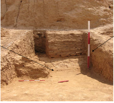 کاوش های باستان شناسی بیانگر برپاشدن شهر بلقیس بر سطح هموار و ایجاد خاکریز مصنوعی بر پشت ارگ